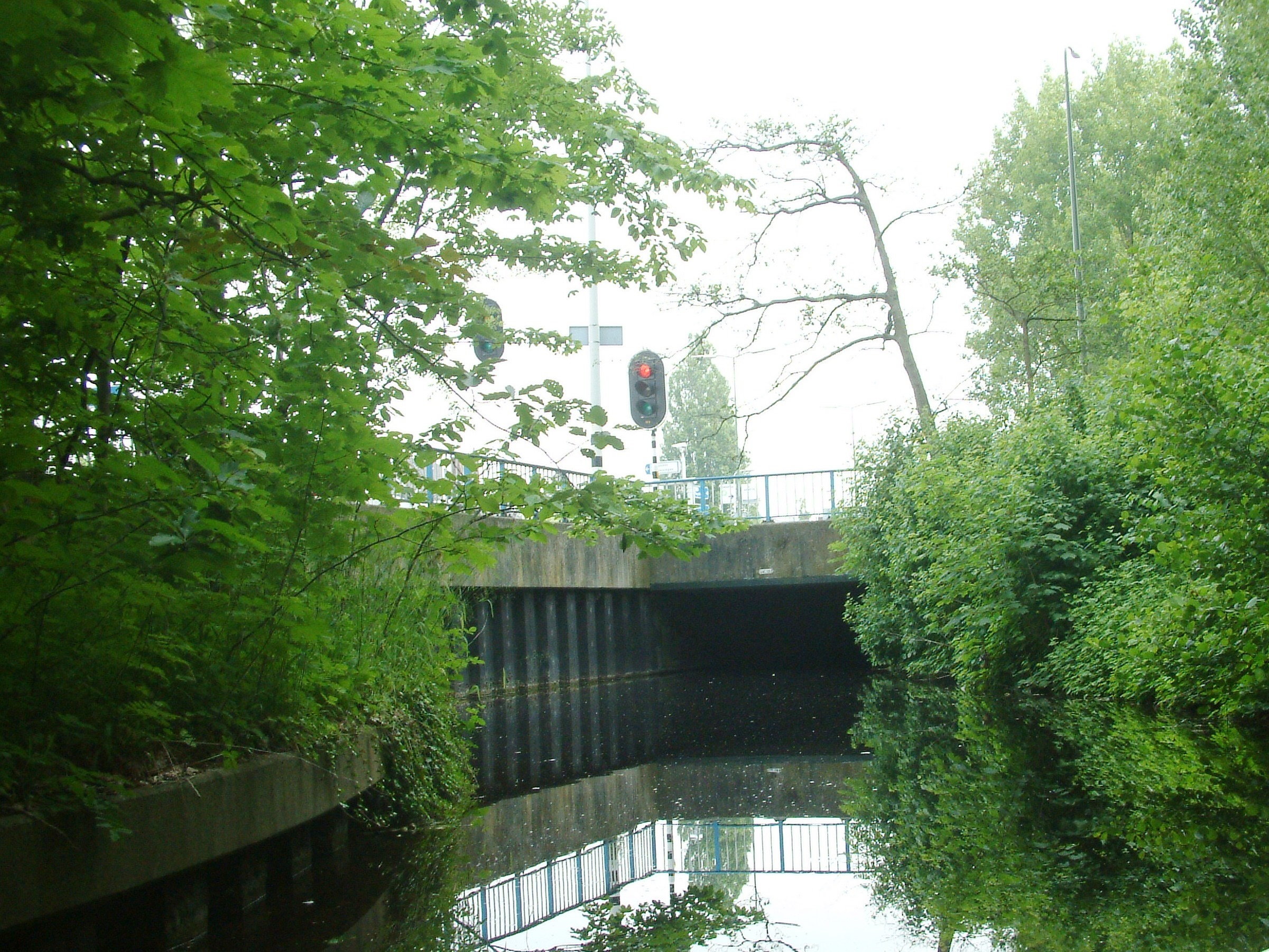 Bridges in The Hague as mentioned in the filename.